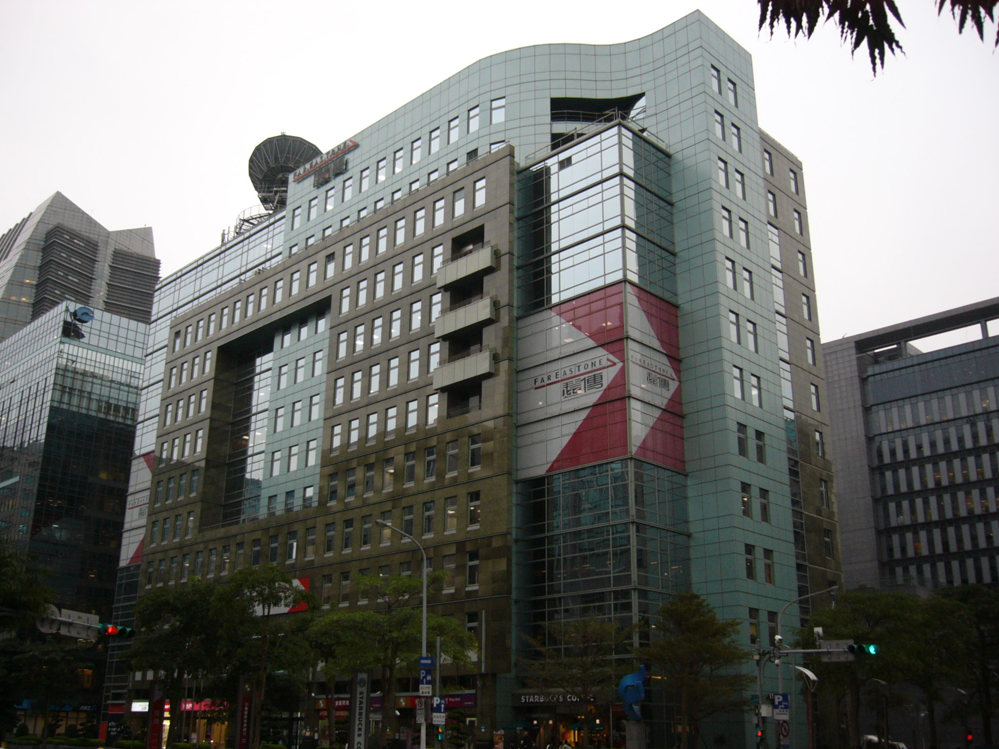 位於台灣台北市內湖區瑞光路的遠傳電信總部右前方外觀。